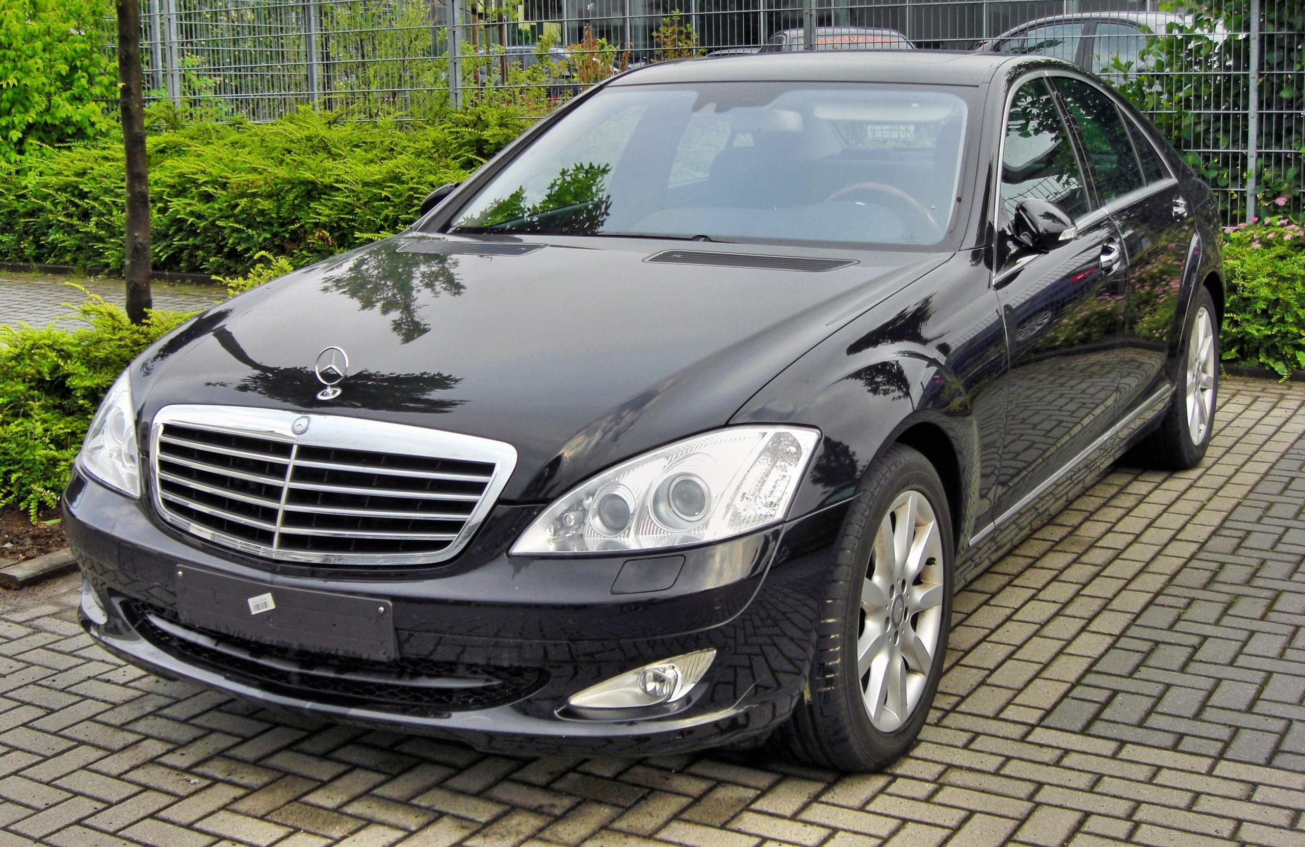 Mercedes S-Klasse